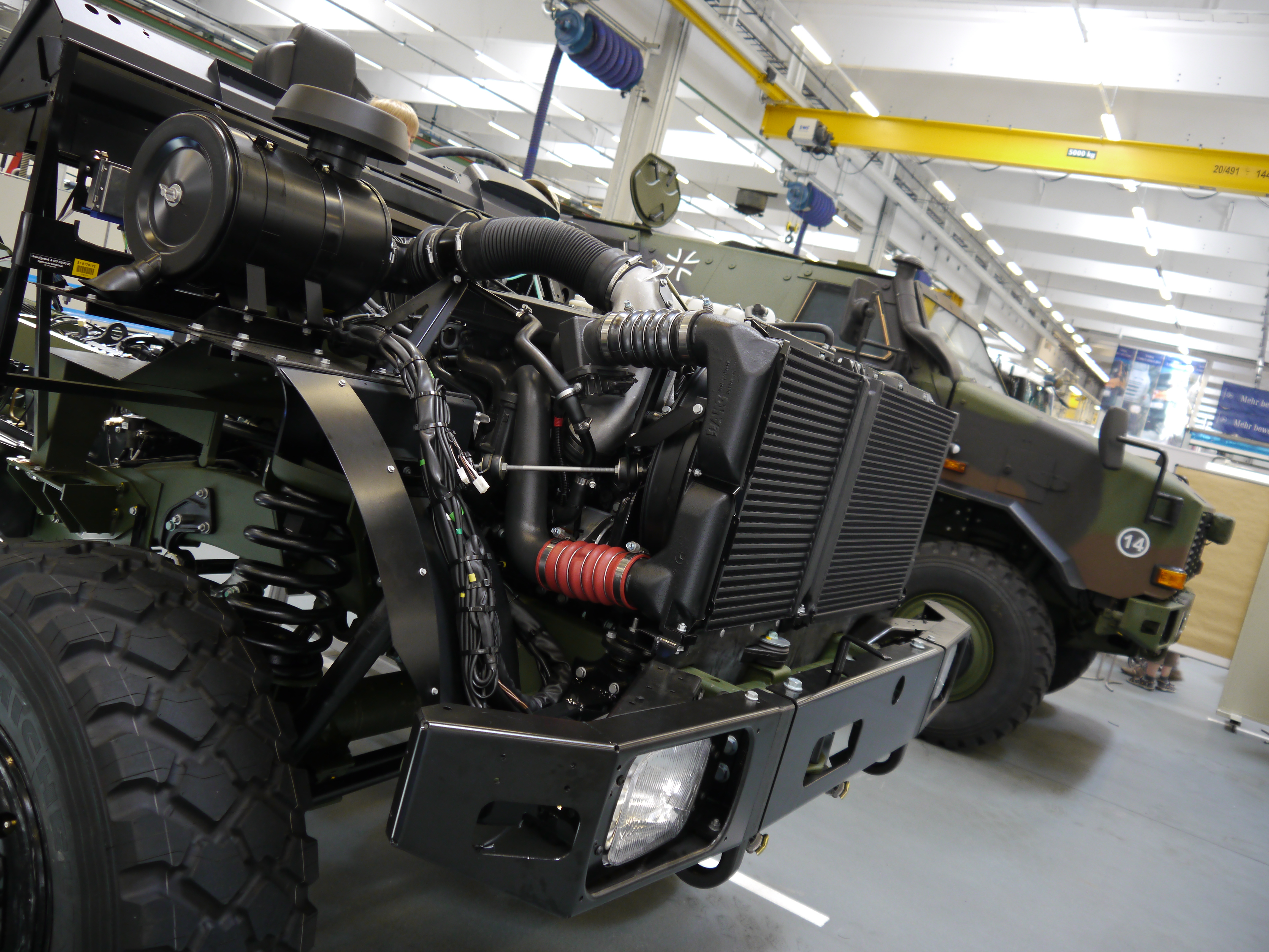 60 Jahre Unimog - Wörth 2011 314 Entwicklungswerkstatt